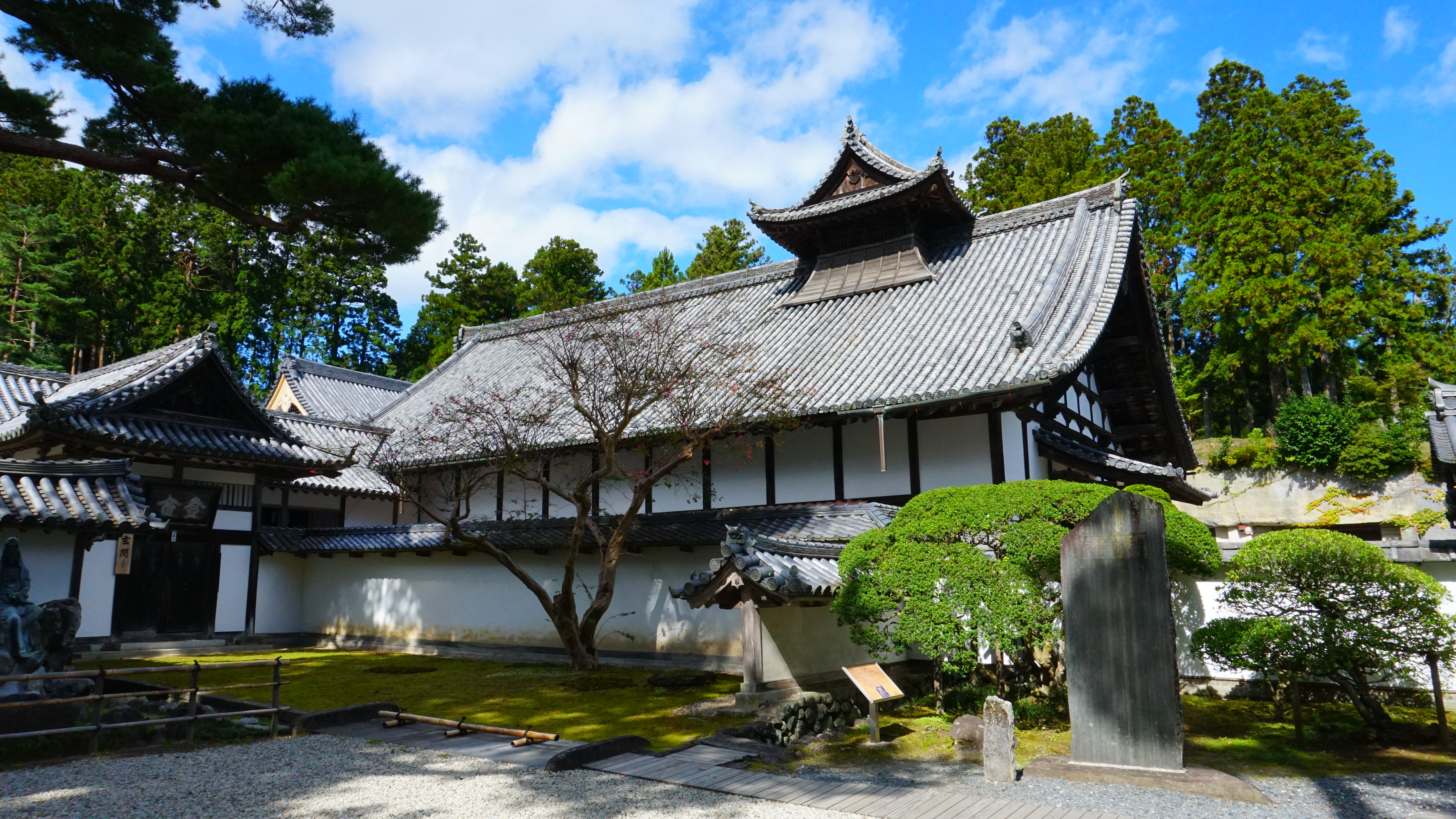 瑞巌寺 庫裡（国宝）